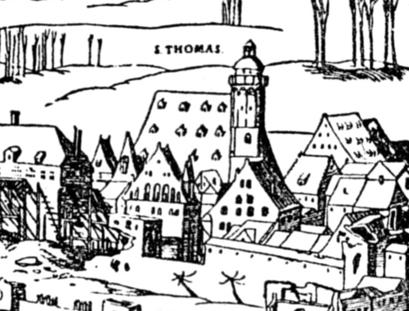 Belagerung von Leipzig 1547